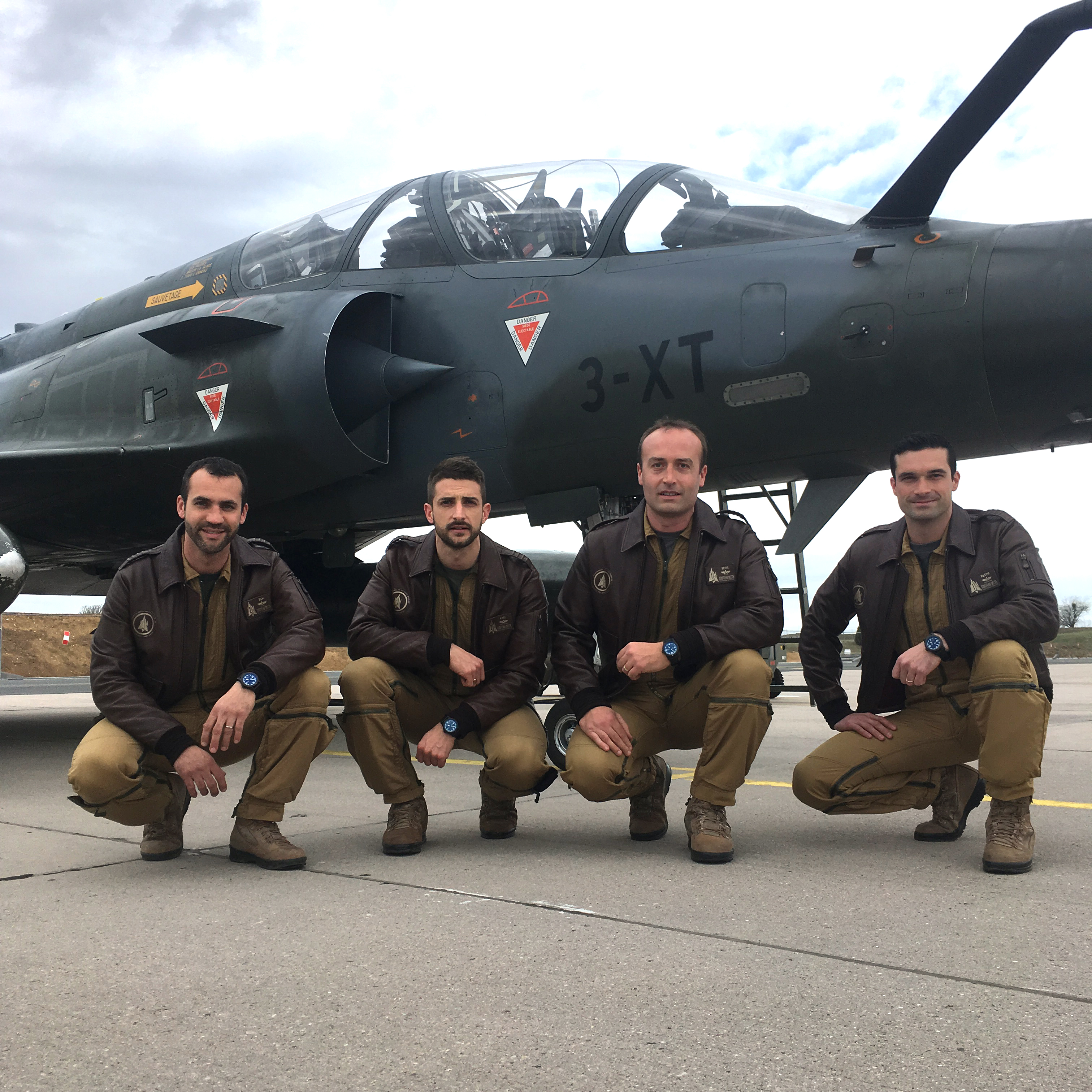 San (pilote ailier), Axel (navigateur ailier), Elvis (pilote leader) et Pastif (navigateur leader). Les membres de l'équipe des Couteau Delta, ambassadeurs de l'Armée de l'Air sur Mirage 2000D.